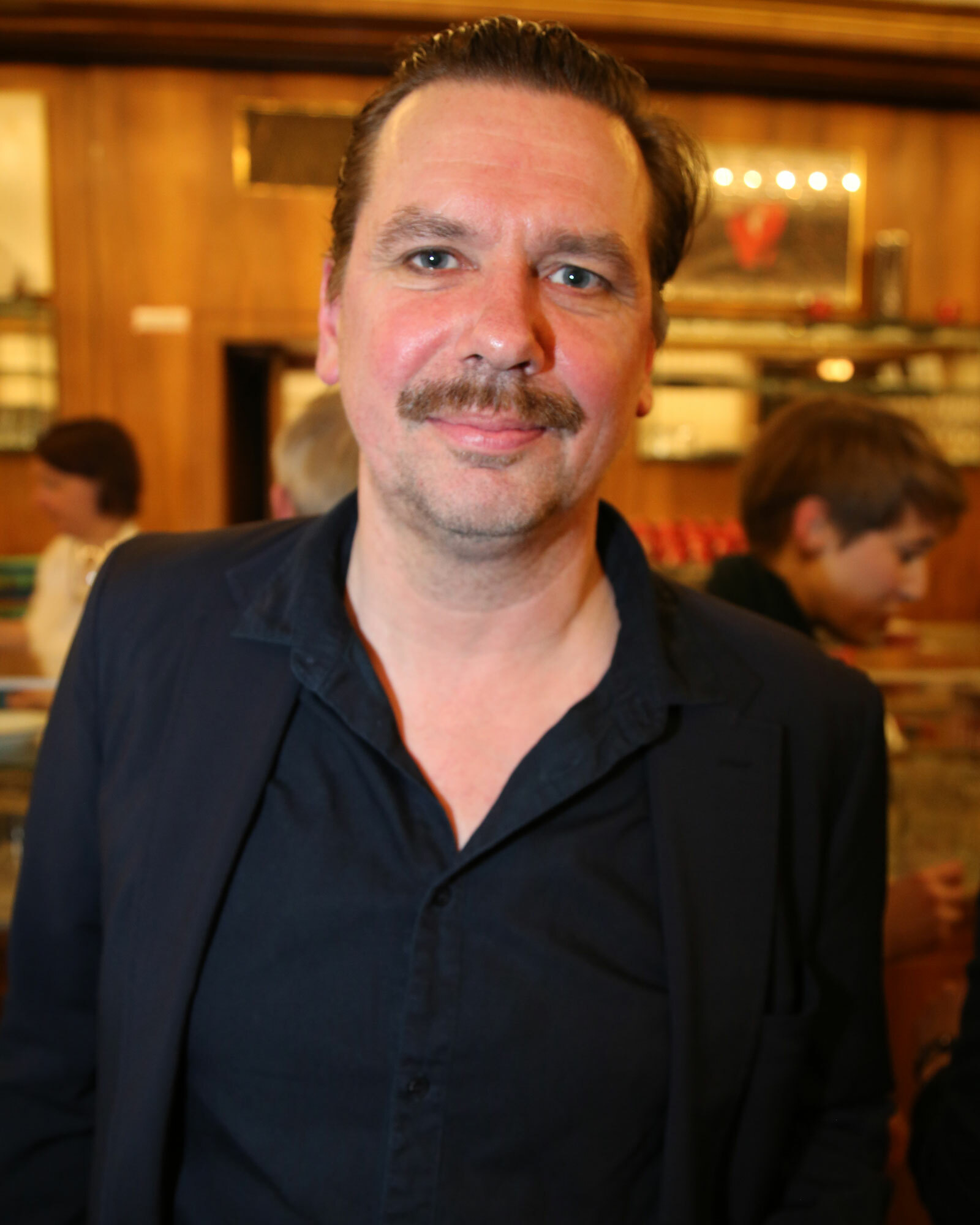 Maertens_Michael-9382